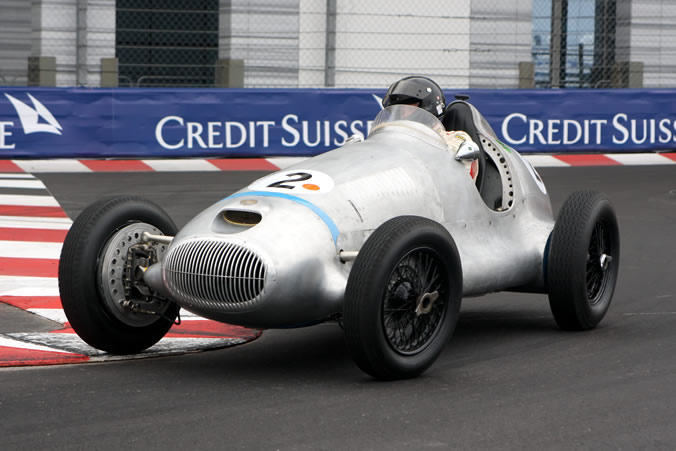 Un des deux exemplaires construites de la CTA-Arsenal de 1947 lors du grand prix historique de Monaco en 2010.